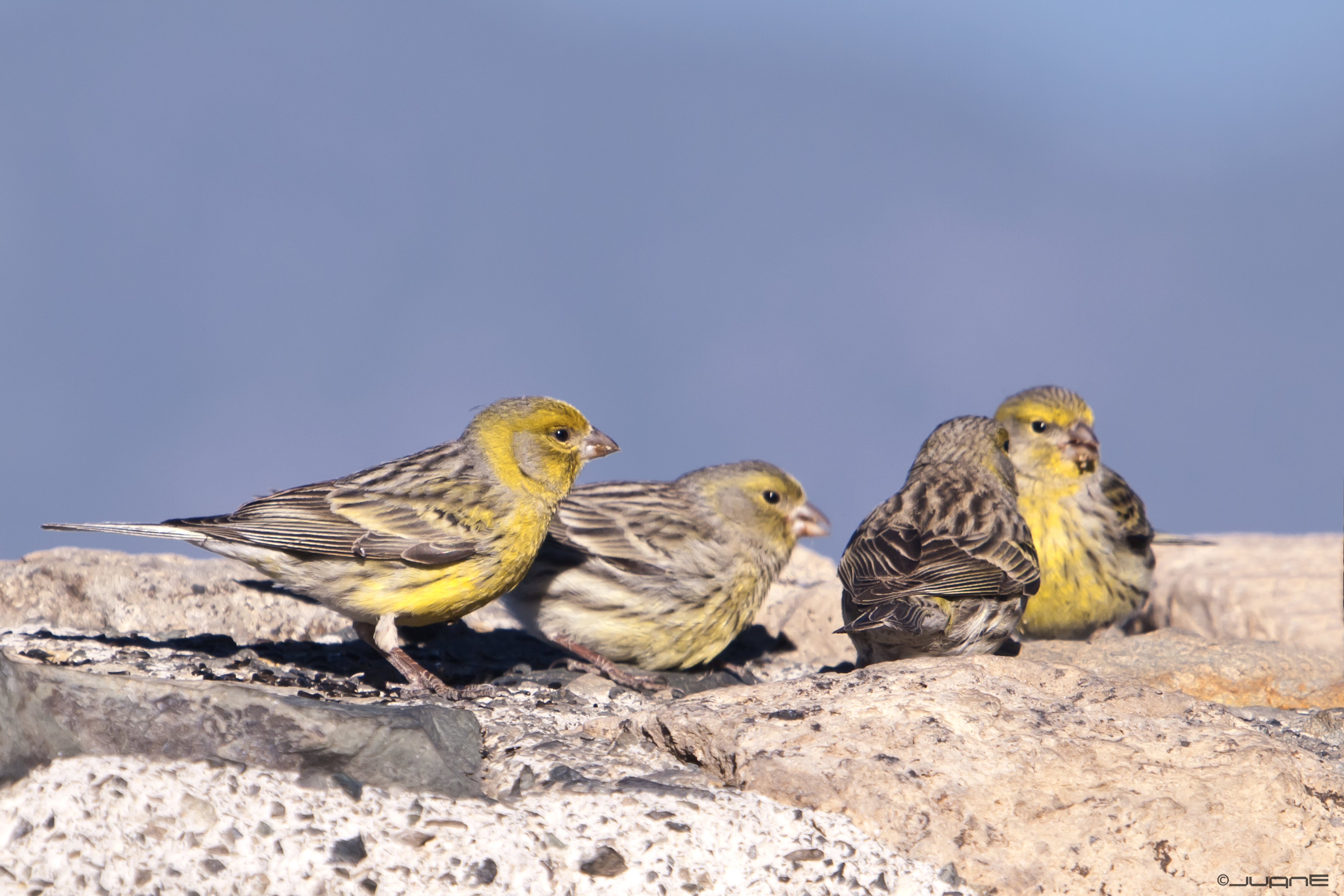 Canario silvestre, Serinus canarius